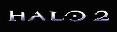 Logo des Videospiels Halo 2